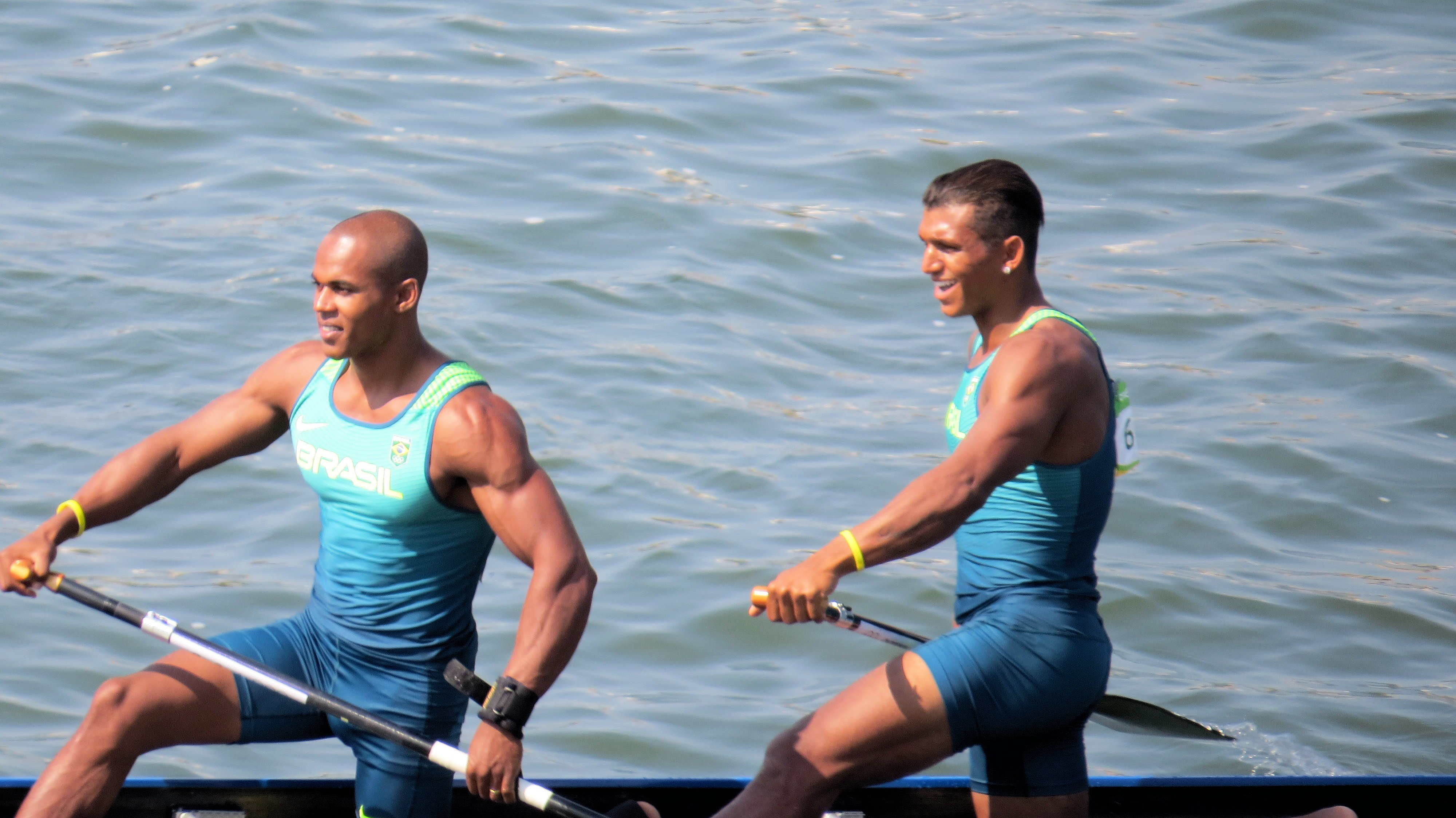 Rio 2016. Canoagem de velocidade/Canoe sprint